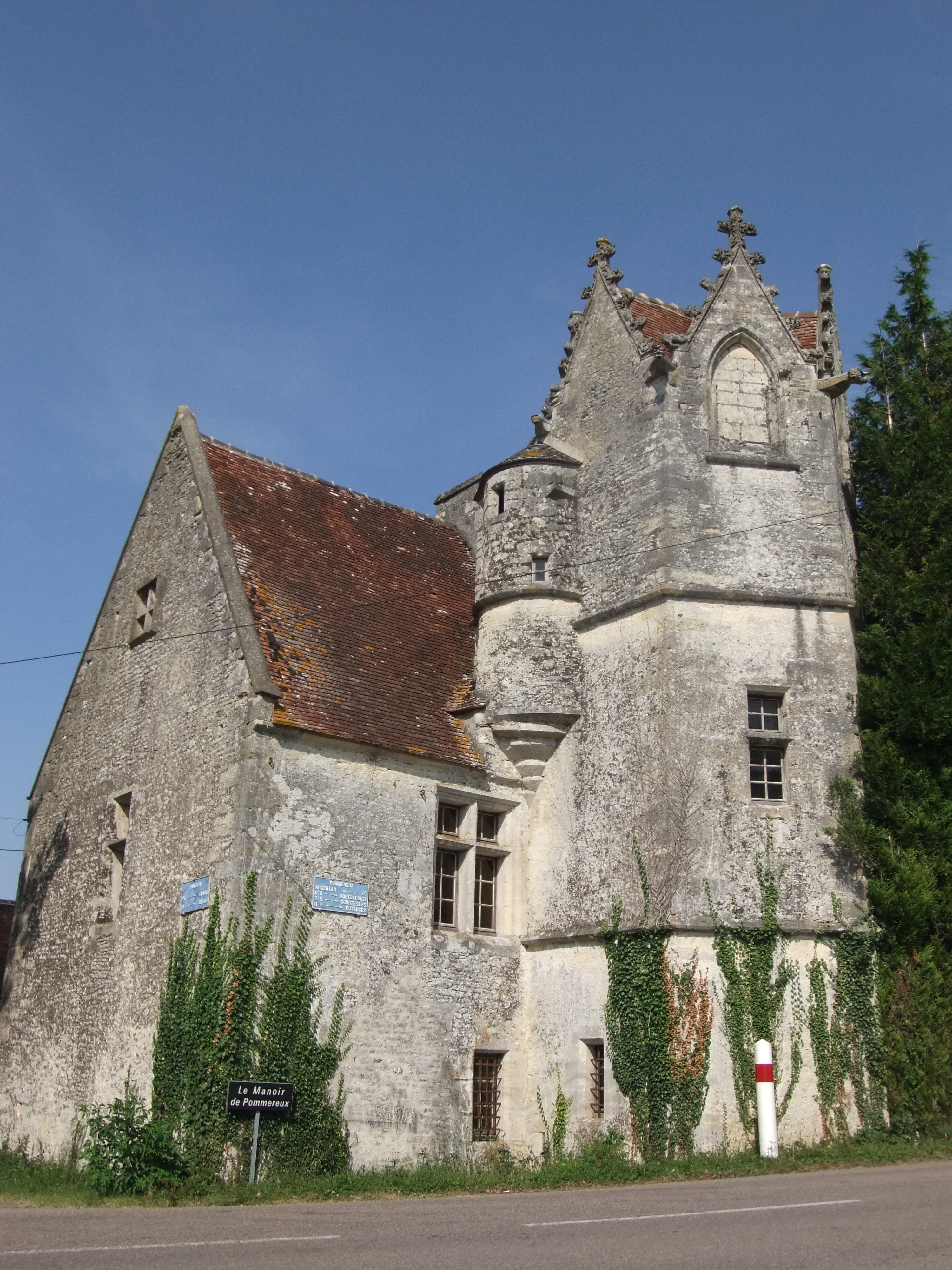 classé MH .